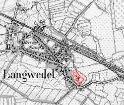 Langwedel auf Messtischblatt 1:25.000 von 1897 – farblich hervorgehoben die Windmühle auf dem Wall der Burg